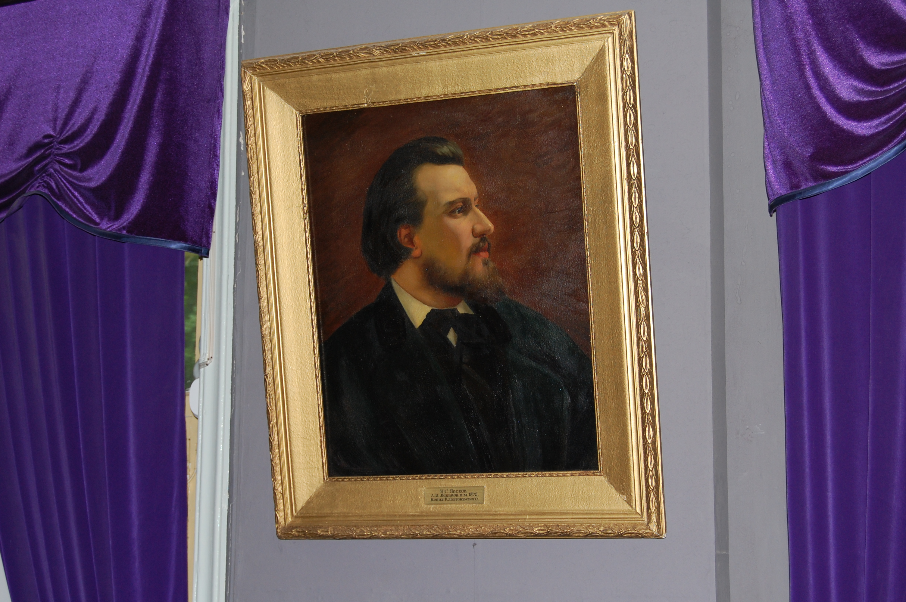 Портрет Н.С.Лескова кисти А.З.Ледакова (1872), копия Клабуновского